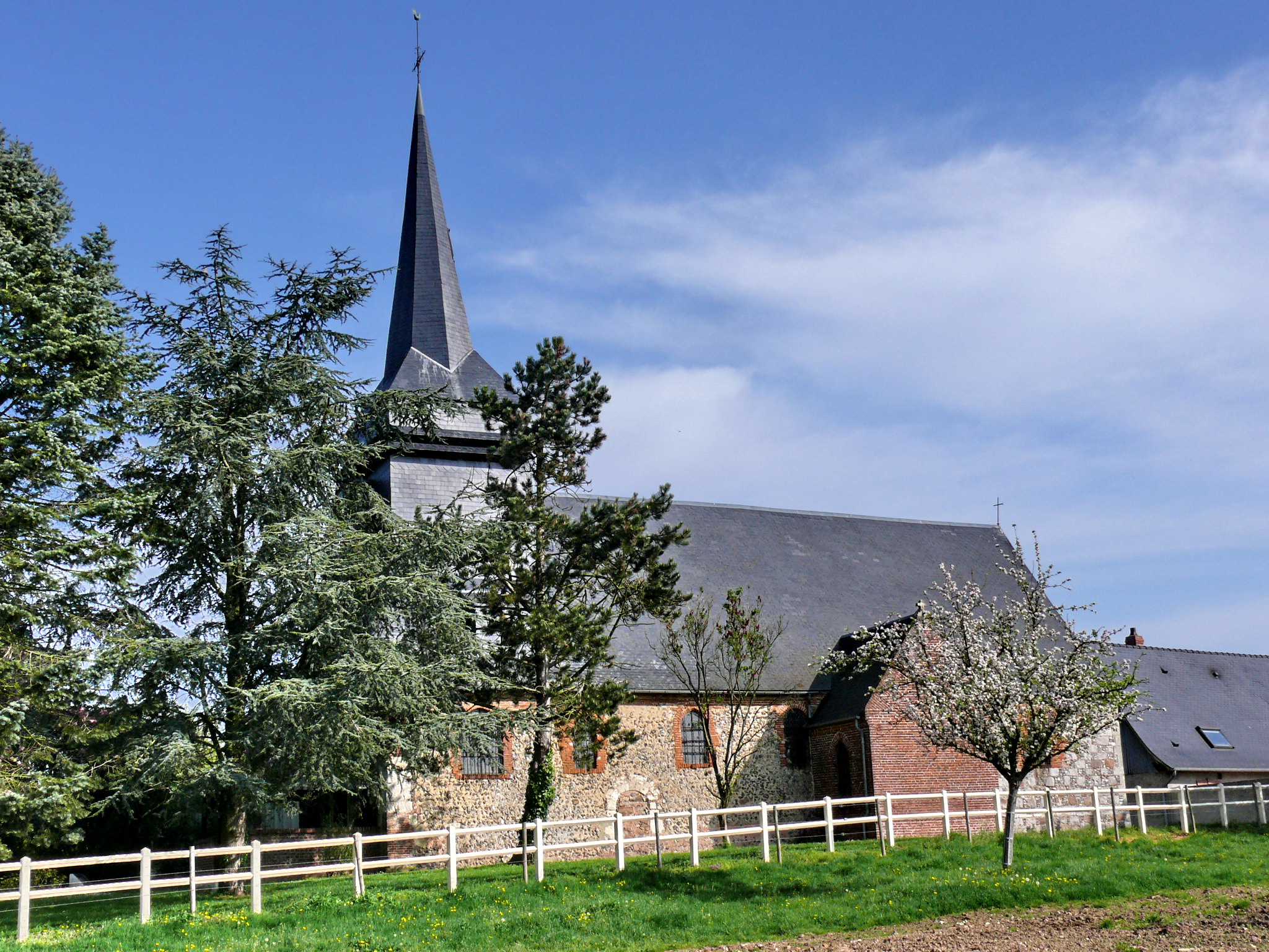 Rothois : L'église